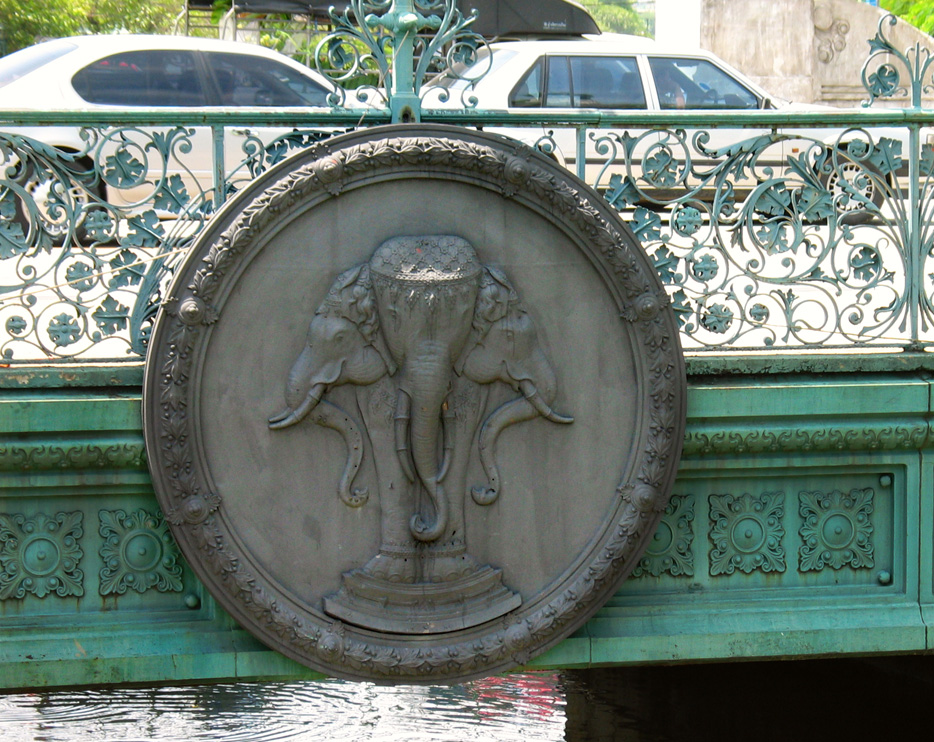 Bangkok seal at Saphan Makawan Rangsun (Bridge of Rajdamnern Nok Road over Klong Phadung Krung Kasem) in Bangkok